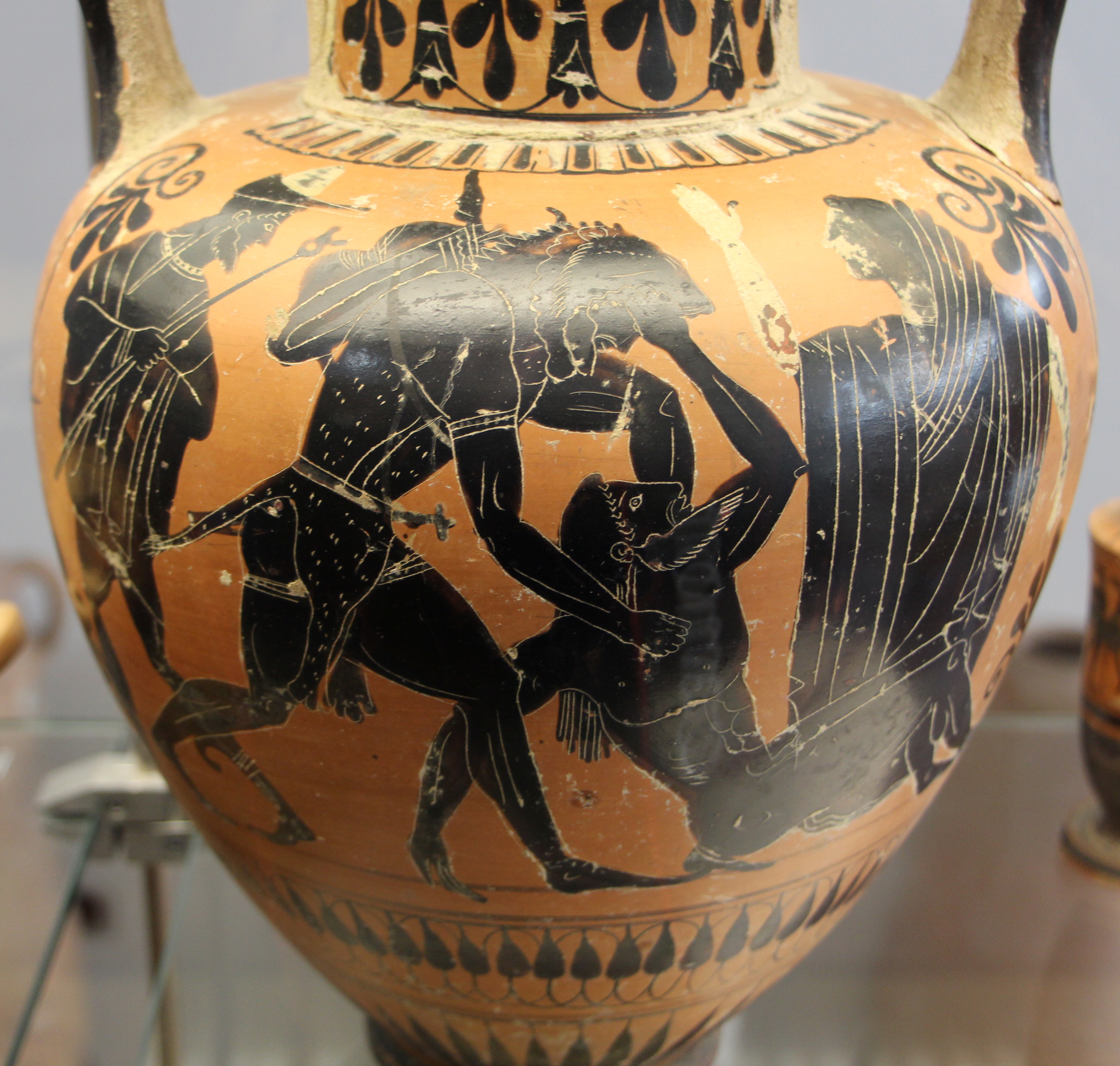 Museo archeologico nazionale G.A. Sanna - MIBAC The making of this document was supported by Wikimedia CH. (Submit your project!) For all the files concerned, please see the category Supported by Wikimedia CH. This is a photo of a monument which is part of cultural heritage of Italy.